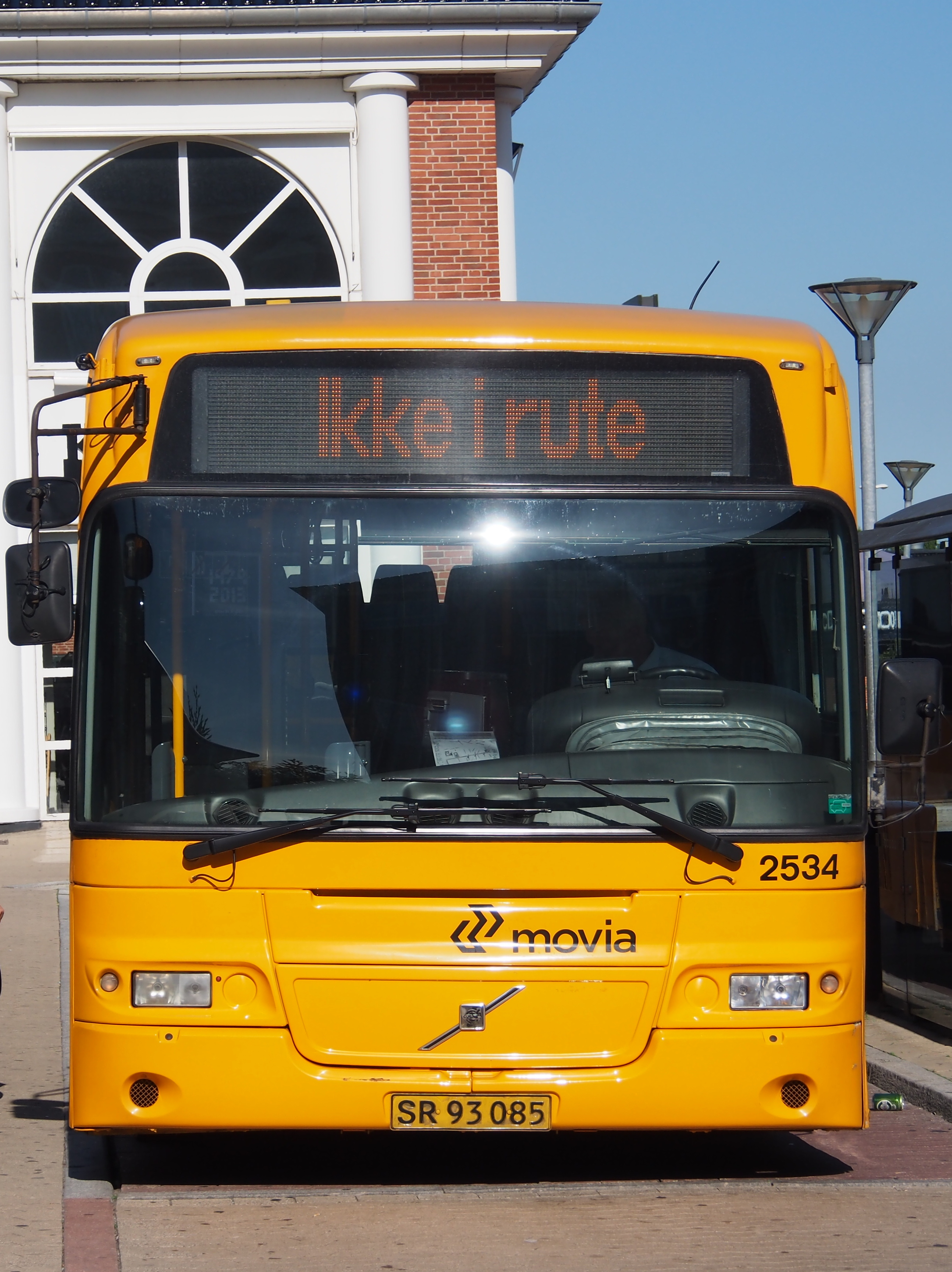 Photographed in Koge, Denmark.